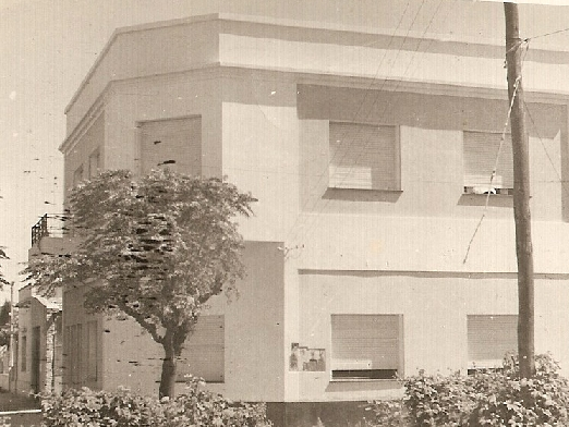 Fotografia de los '60, esquina de San Martín y Francia (familia Ureta/Quintero).